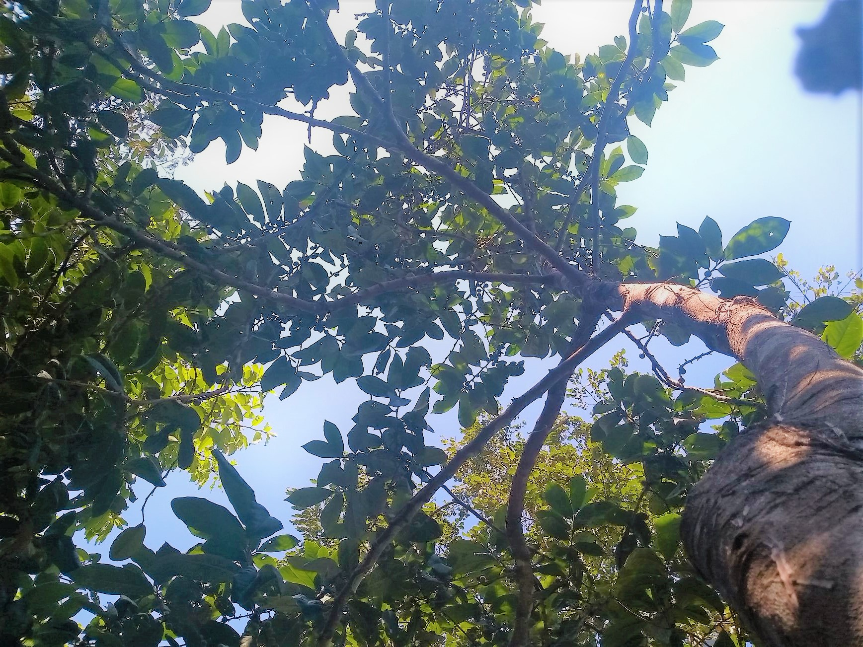 Tronco de Tabocuva